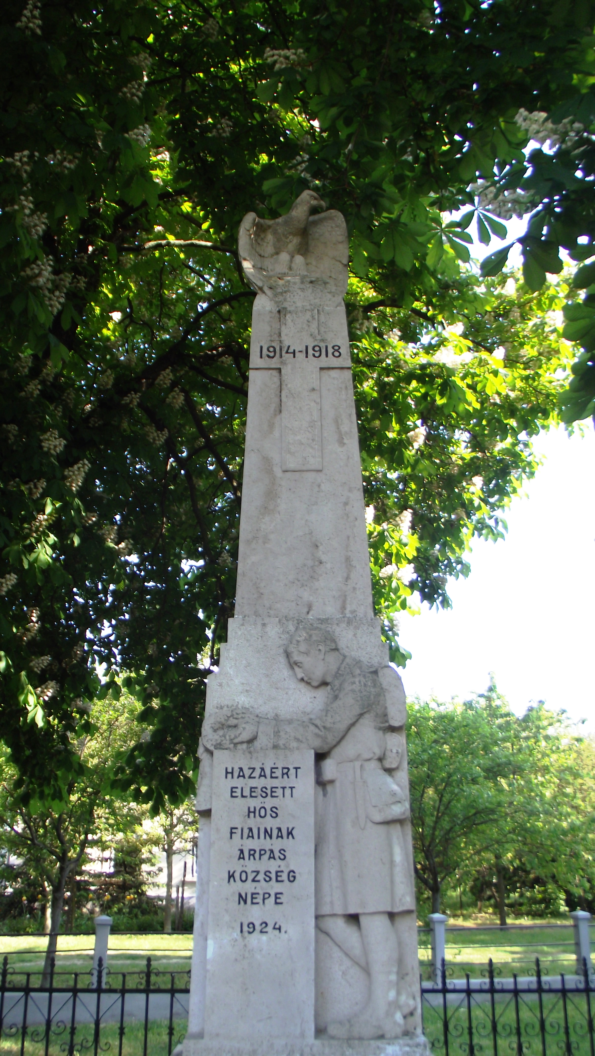 Az árpási hősi halottak emlékműve a Kápolna téren. Szabó János, Szabó Sándor, Szigeti Antal, Szijjártó Ferenc (tz), Dombi Kálmán, Endrédi Géza, Gerencsér Lajos, Horváth Dávid (örv.), Horváth György, Katona Mihály, Malkovics Ferenc, Babics Sándor, Dombi G Sándor, Gerencsér Sándor, Peti József, Szigeti Mihály, Horváth Gyula (örv.), Horváth Gyula, Molnár János, Nagy Lajos, Tompos József, Csapó Lajos, Pénzes Ferenc, Németh József, Tóth József, Vatai Imre, Zukály Mihály, Eöri Ferenc, Molnár Lajos, Csapó József, Nagy György, Bognár Mihály, Németh Imre